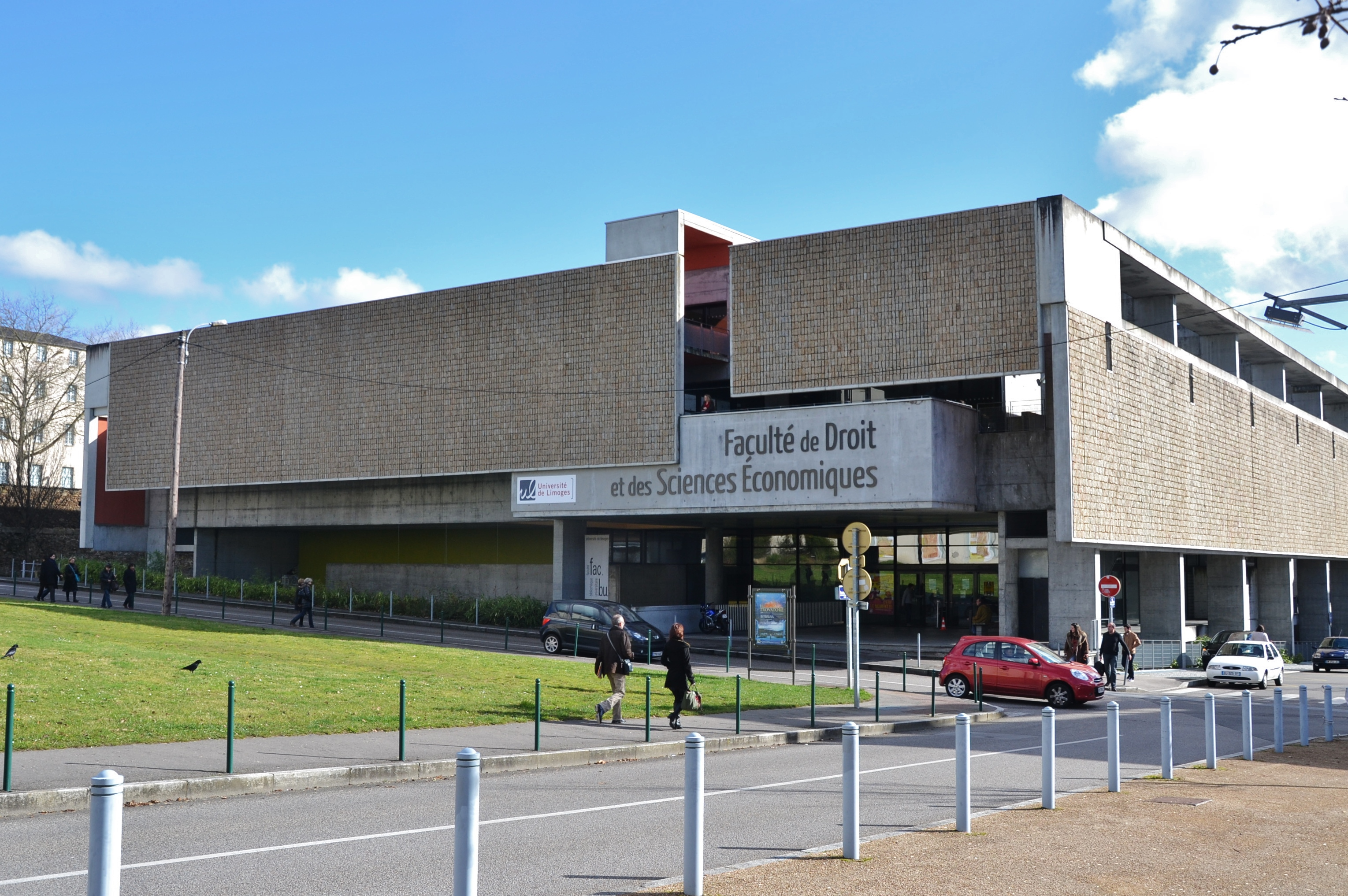 Bâtiment principal de la faculté de droit et sciences économiques de Limoges (Haute-Vienne, France)